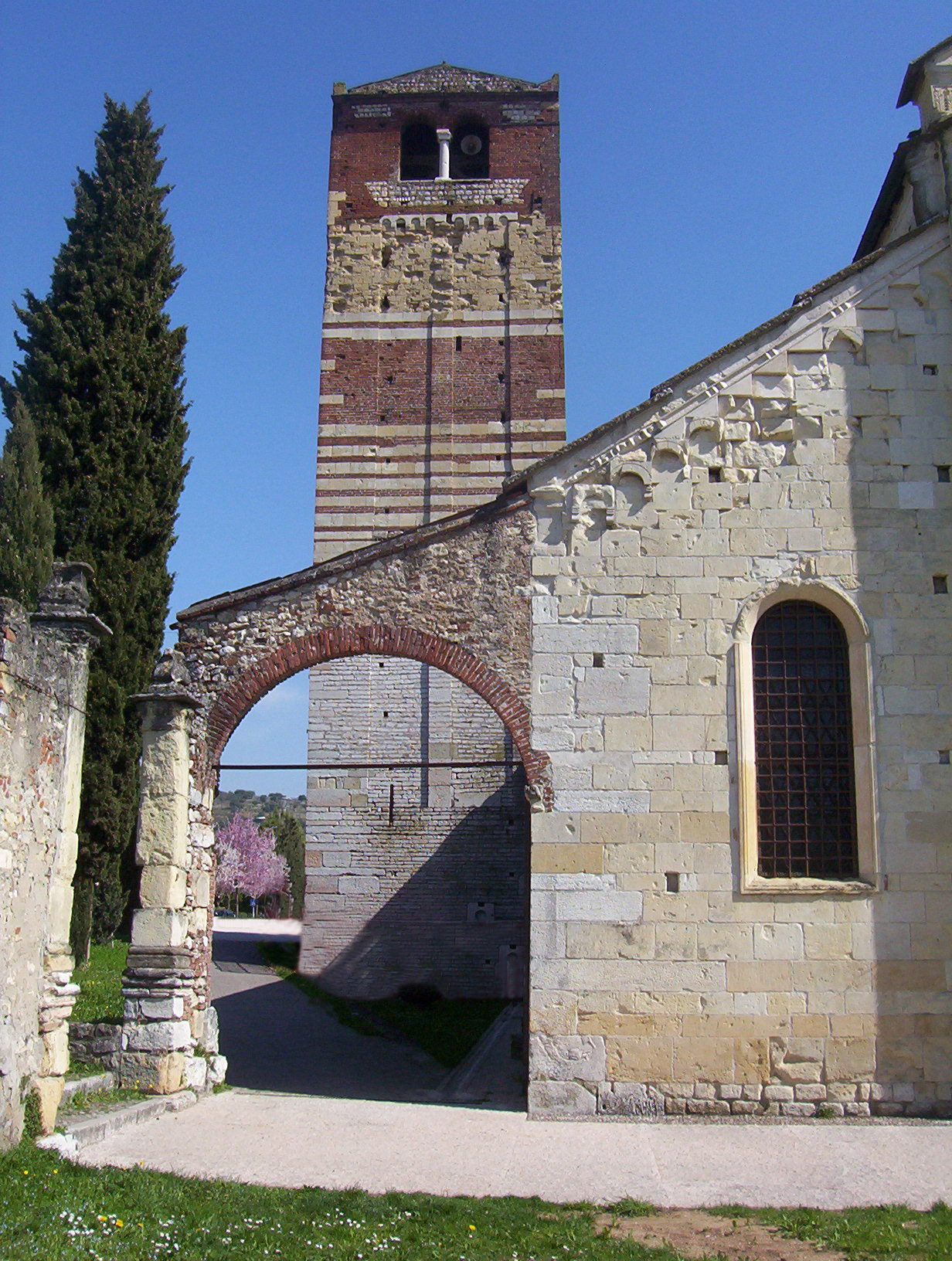 Campanile della Pieve di San Floriano (San Pietro in Cariano - VR)